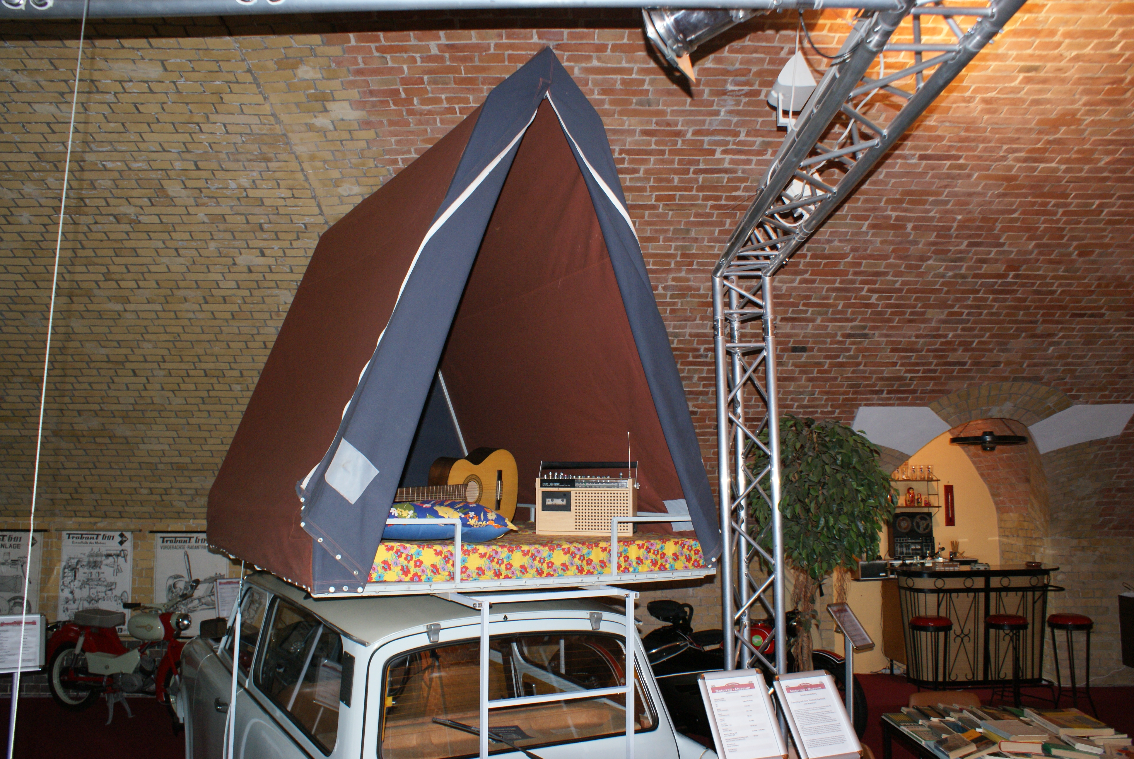 Trabant Dachzelt (Pension Sachenruh)